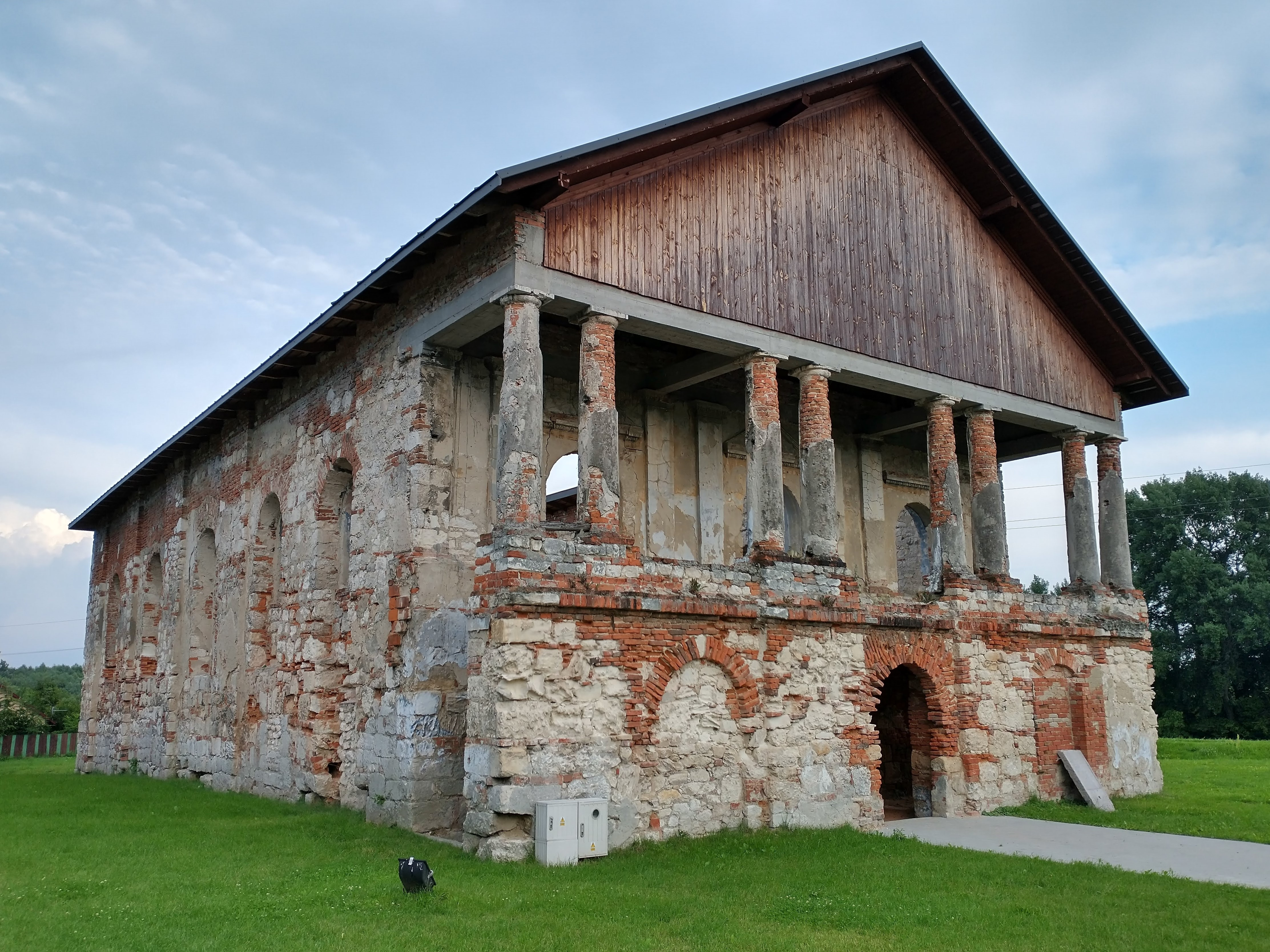 Synagoga w Nowym Korczynie.